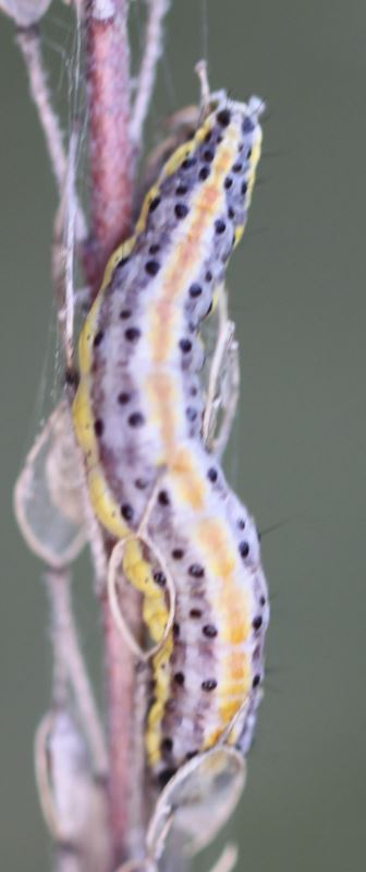 Raupe von Evergestis extimalis an Graukresse, am 3.10.2017 in der Schwetzinger Hardt